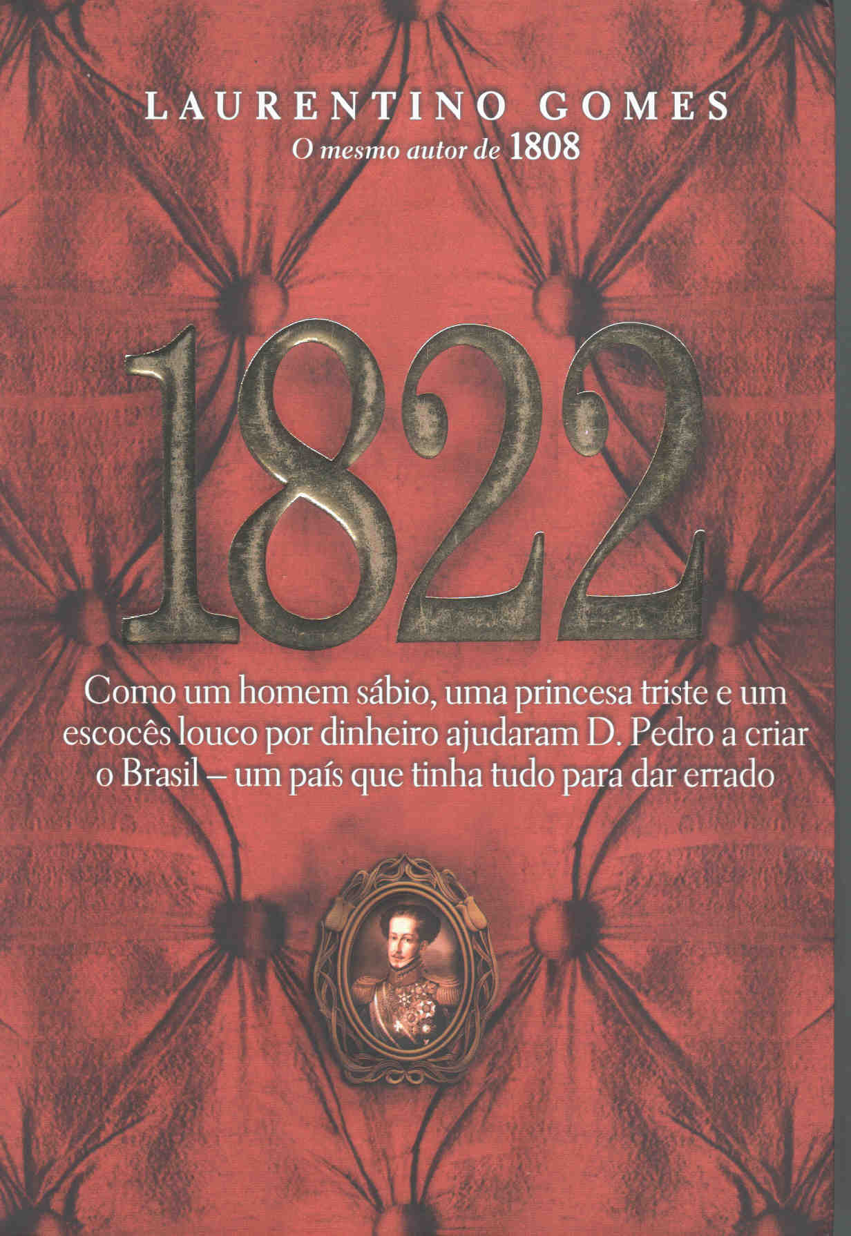 Capa do livro 1822 - Laurentino Gomes